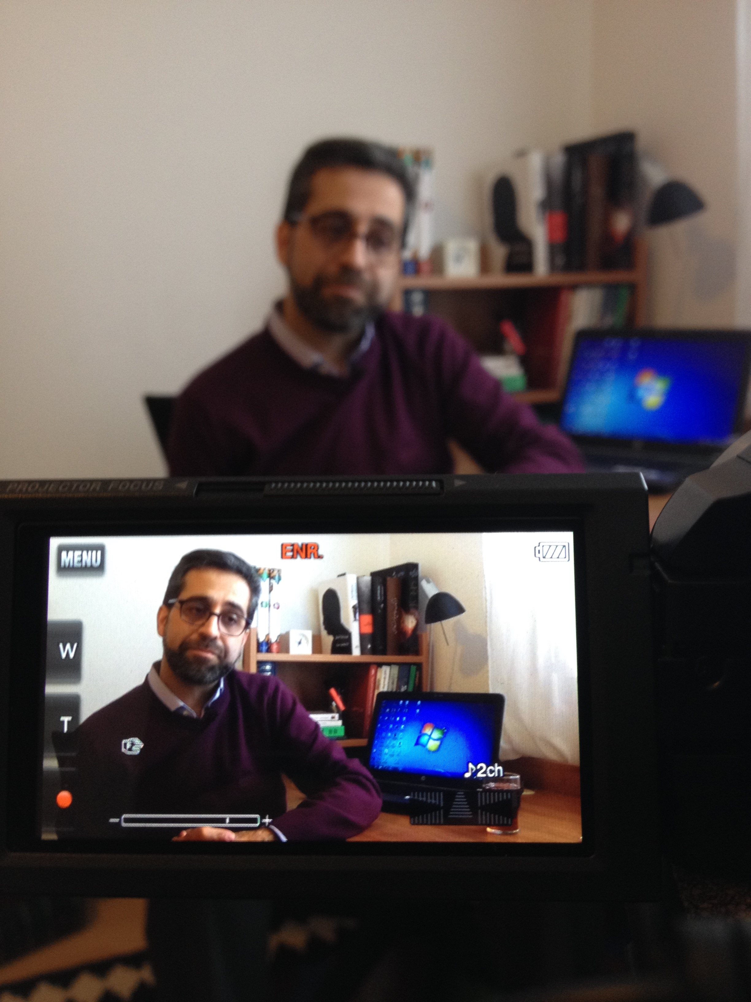 عبدالرضا تاجیک